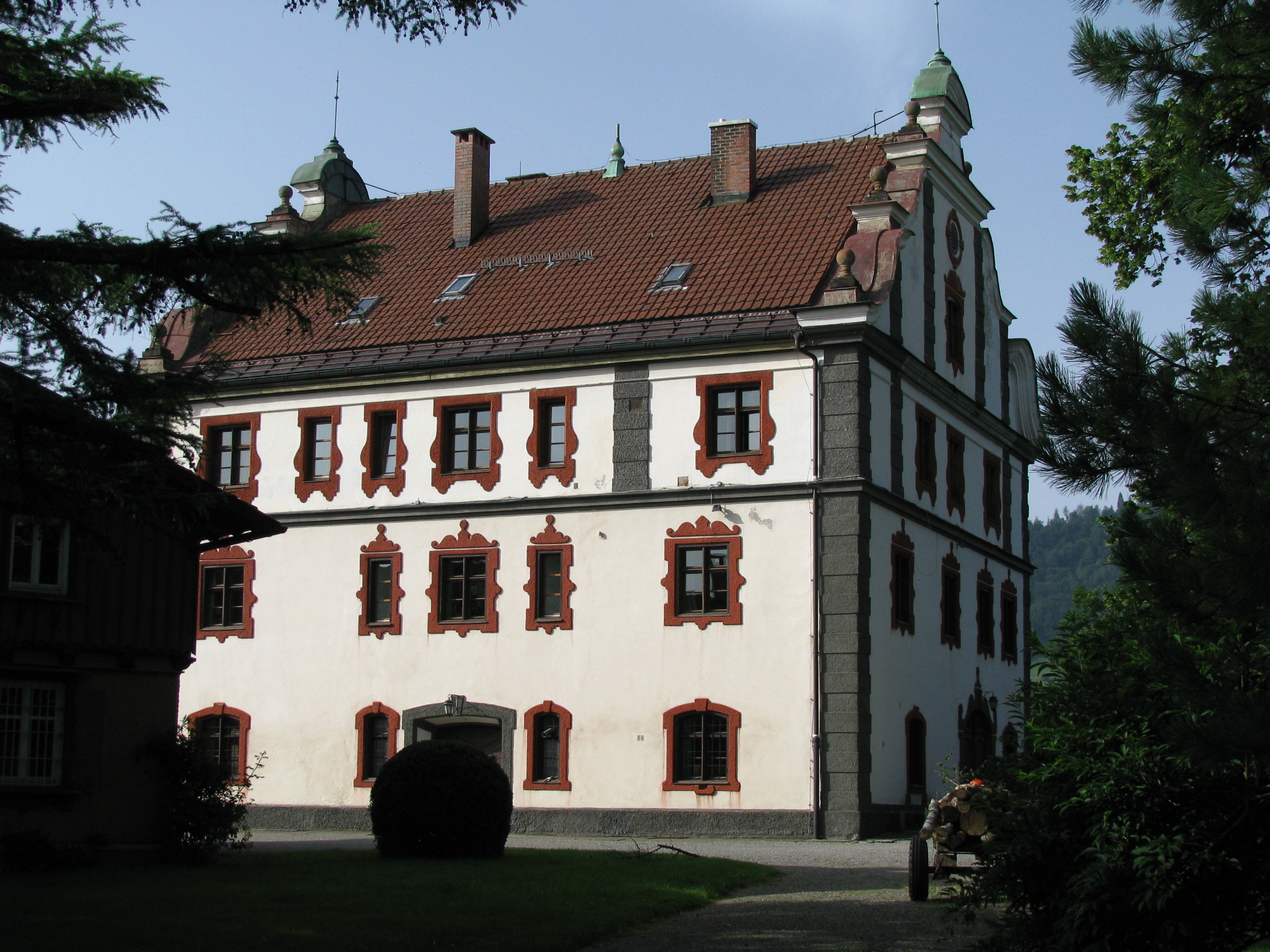 Schloss Rauhenzell, Immenstadt im Allgäu, Landkreis Oberallgäu